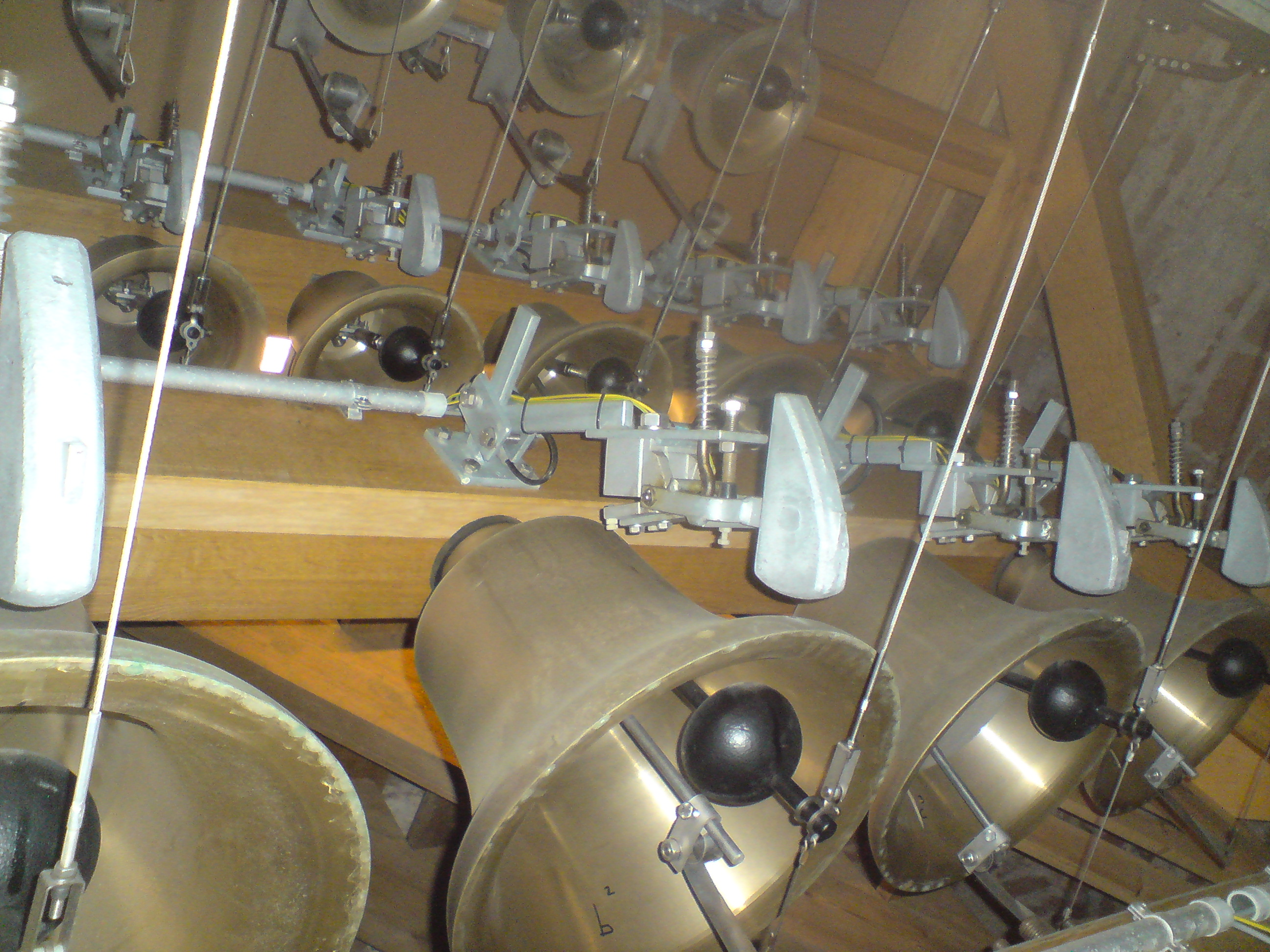 Glocken des Illertisser Carillons